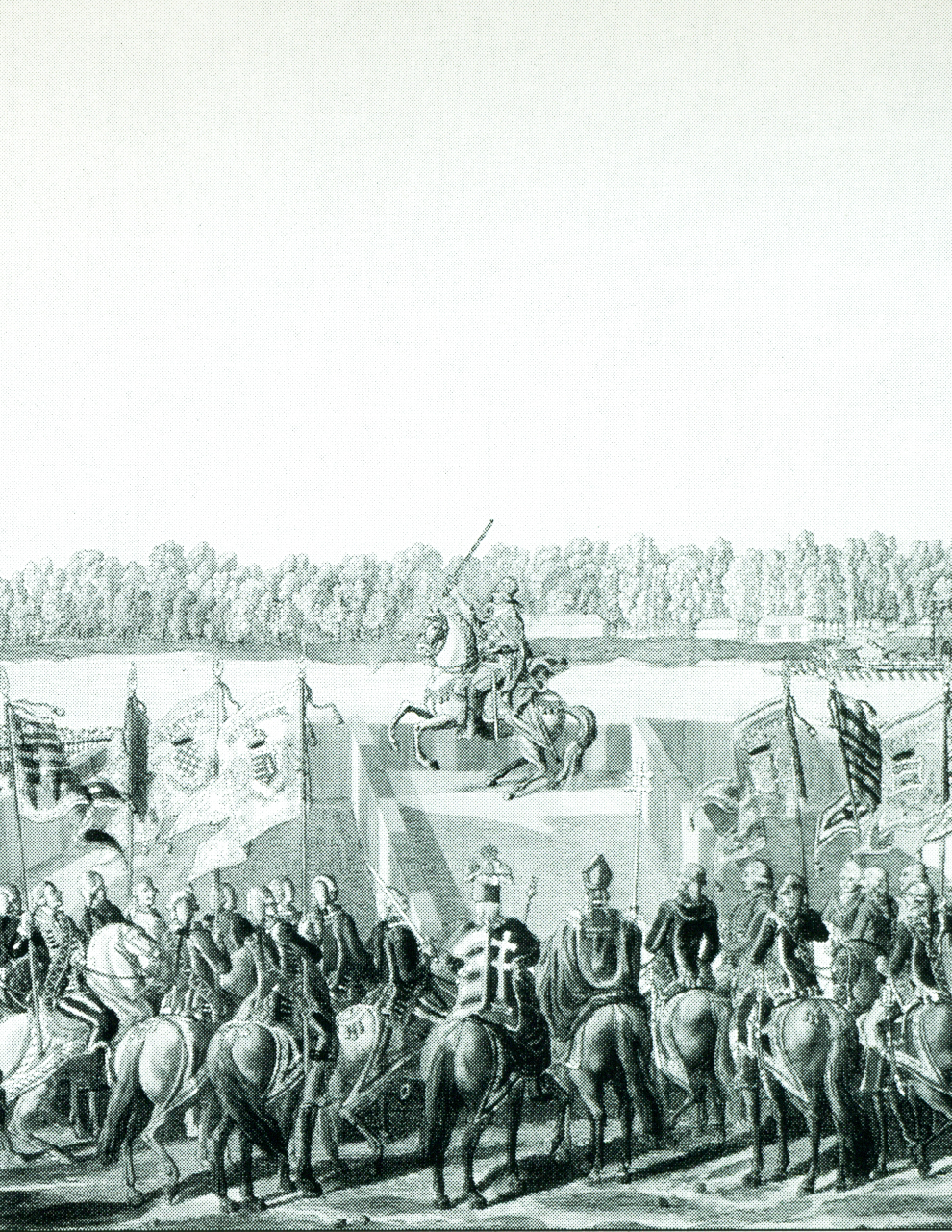 etching, detail